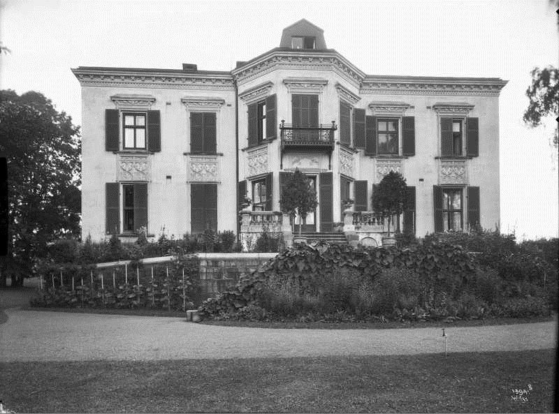 Villa Frognæs, Drammensvn. 79